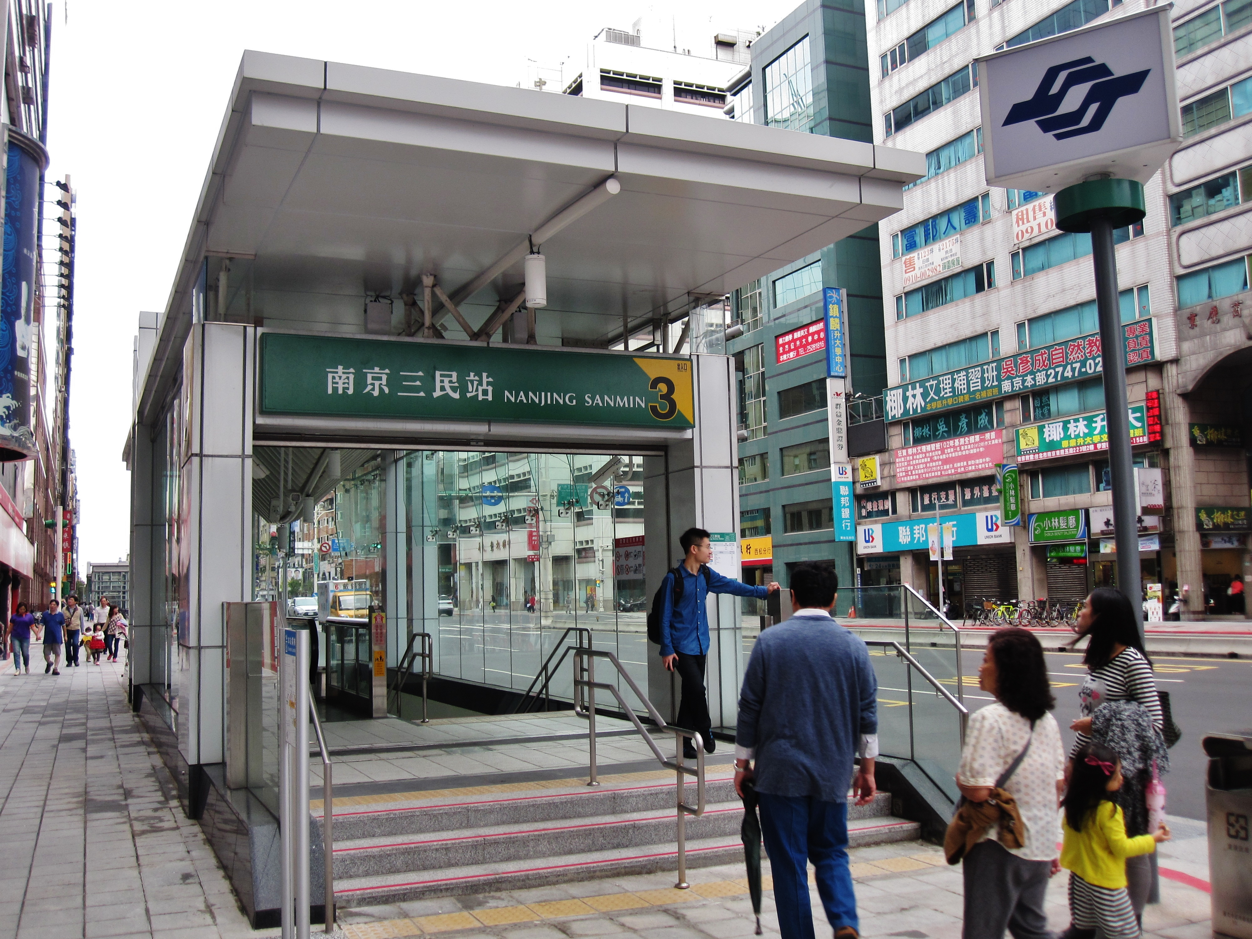 中文（台灣）: 台北捷運南京三民站3號出口。